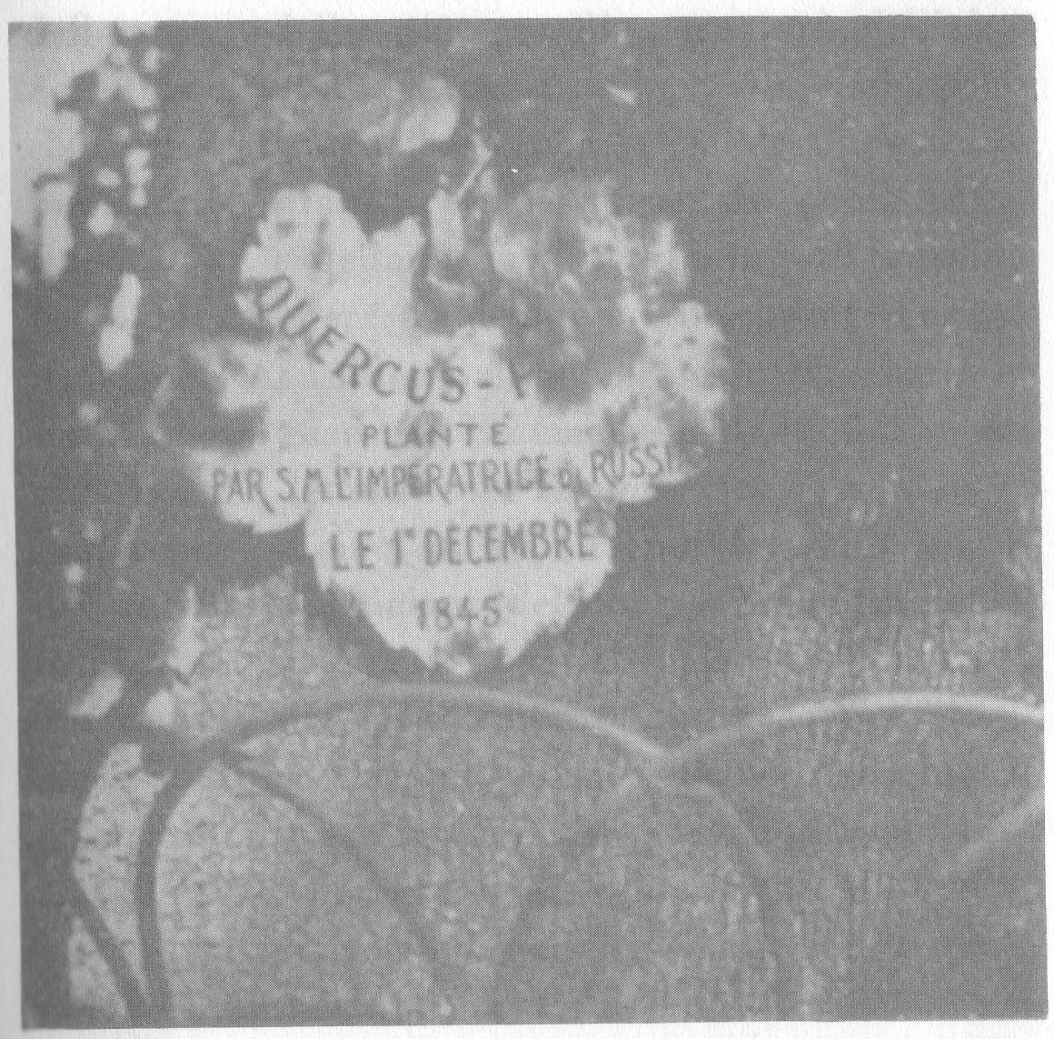 Targa applicata su una quercia piantata all'Olivella da S.M. Alessandra di Russia